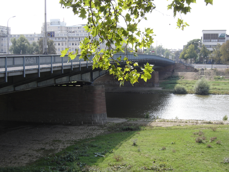 Friedrich-Ebert-Brücke Mannheim.